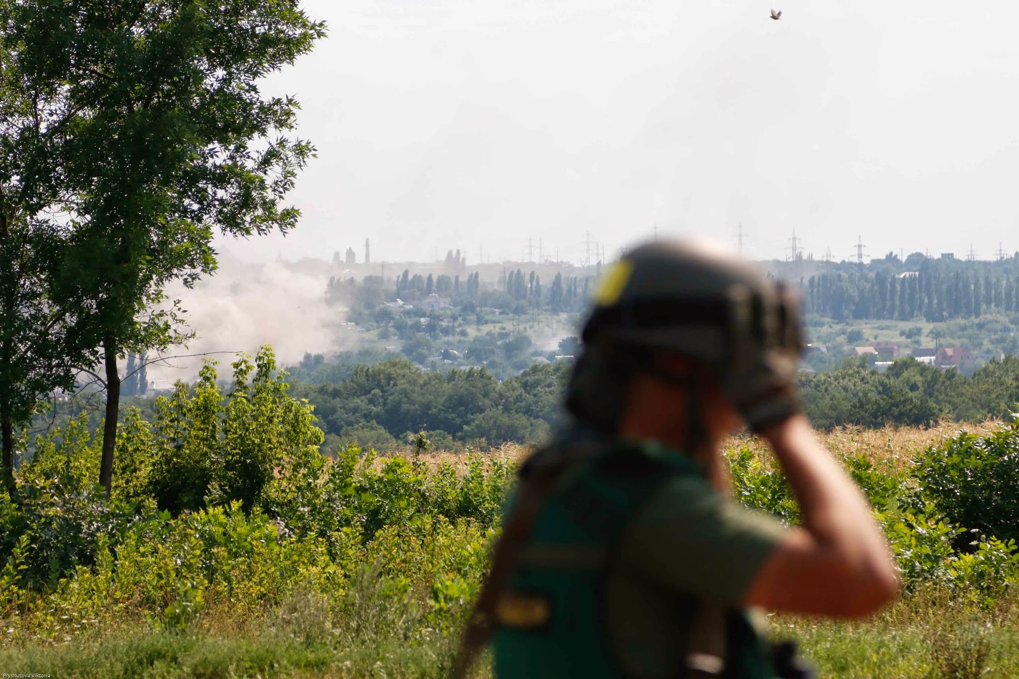 Батальон «Донбасс» под Первомайском